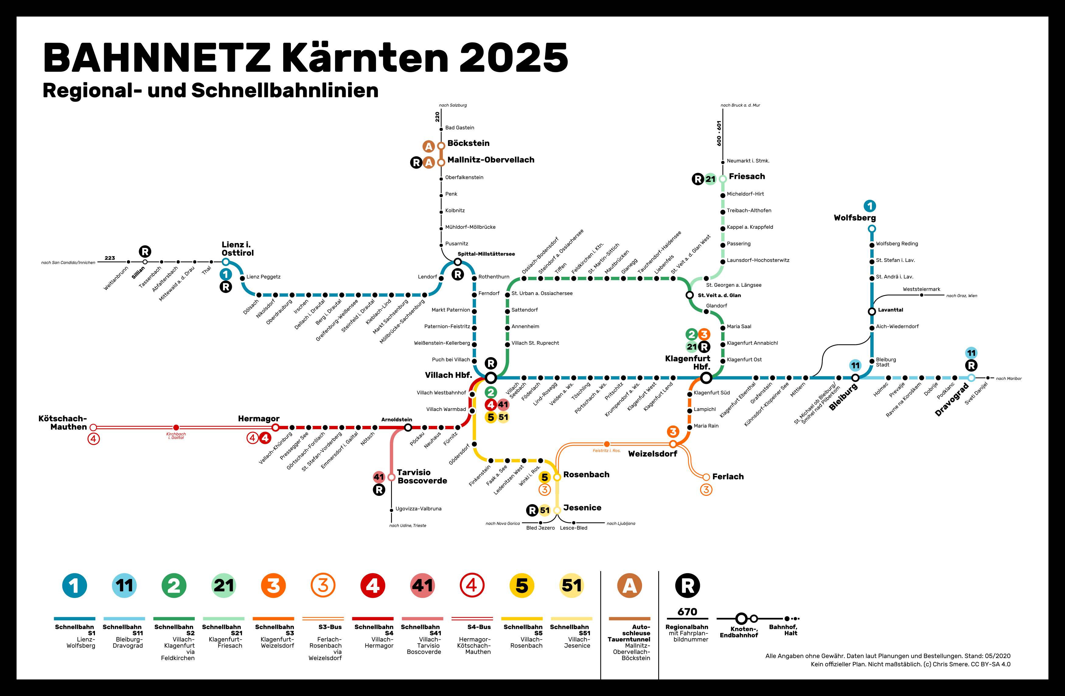 S Bahn Kärnten Planungen für die Zeit nach der Öffnung der Koralmbahn